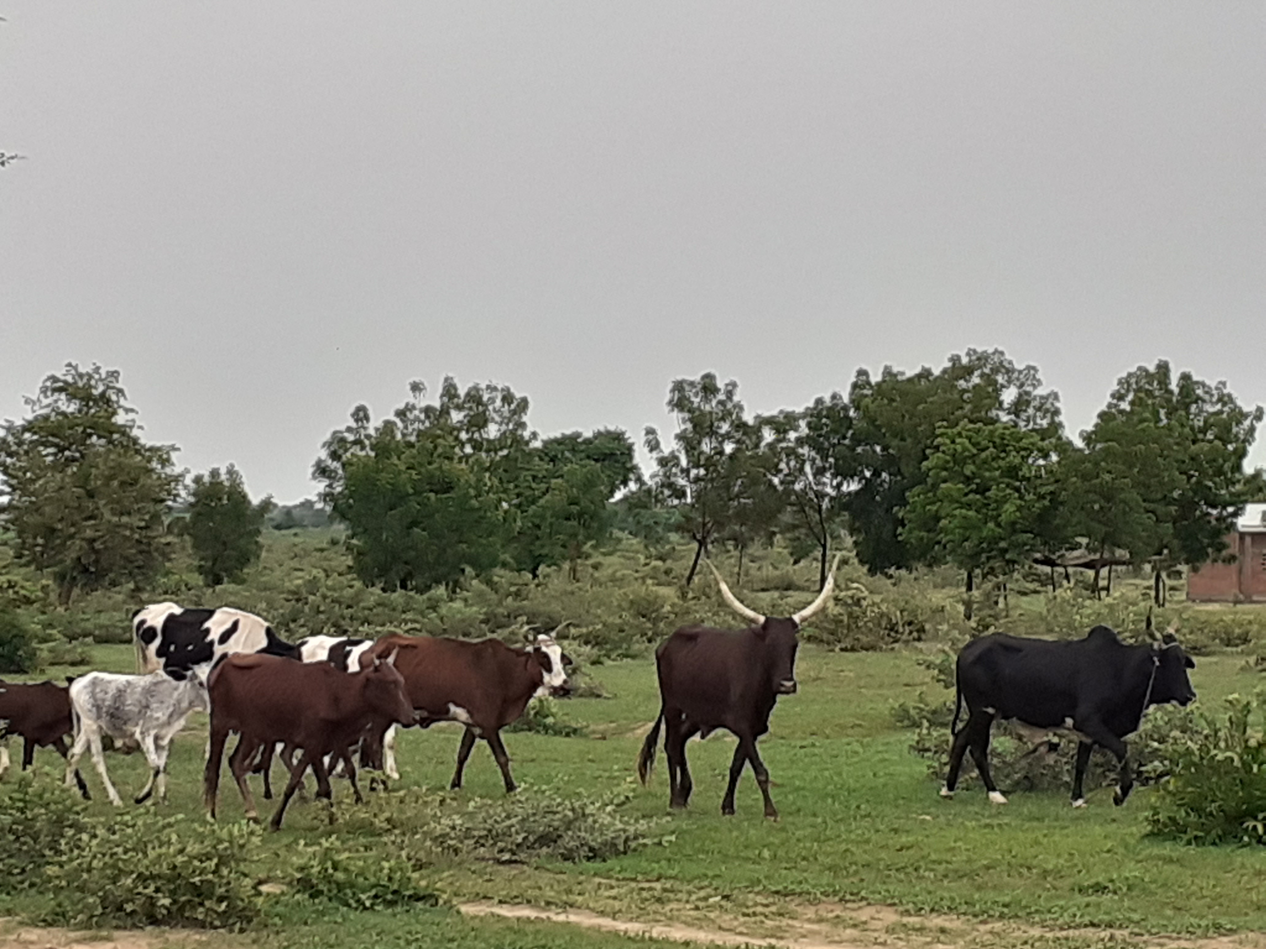 Taureaux et vaches hollandais à wallya Cameroun